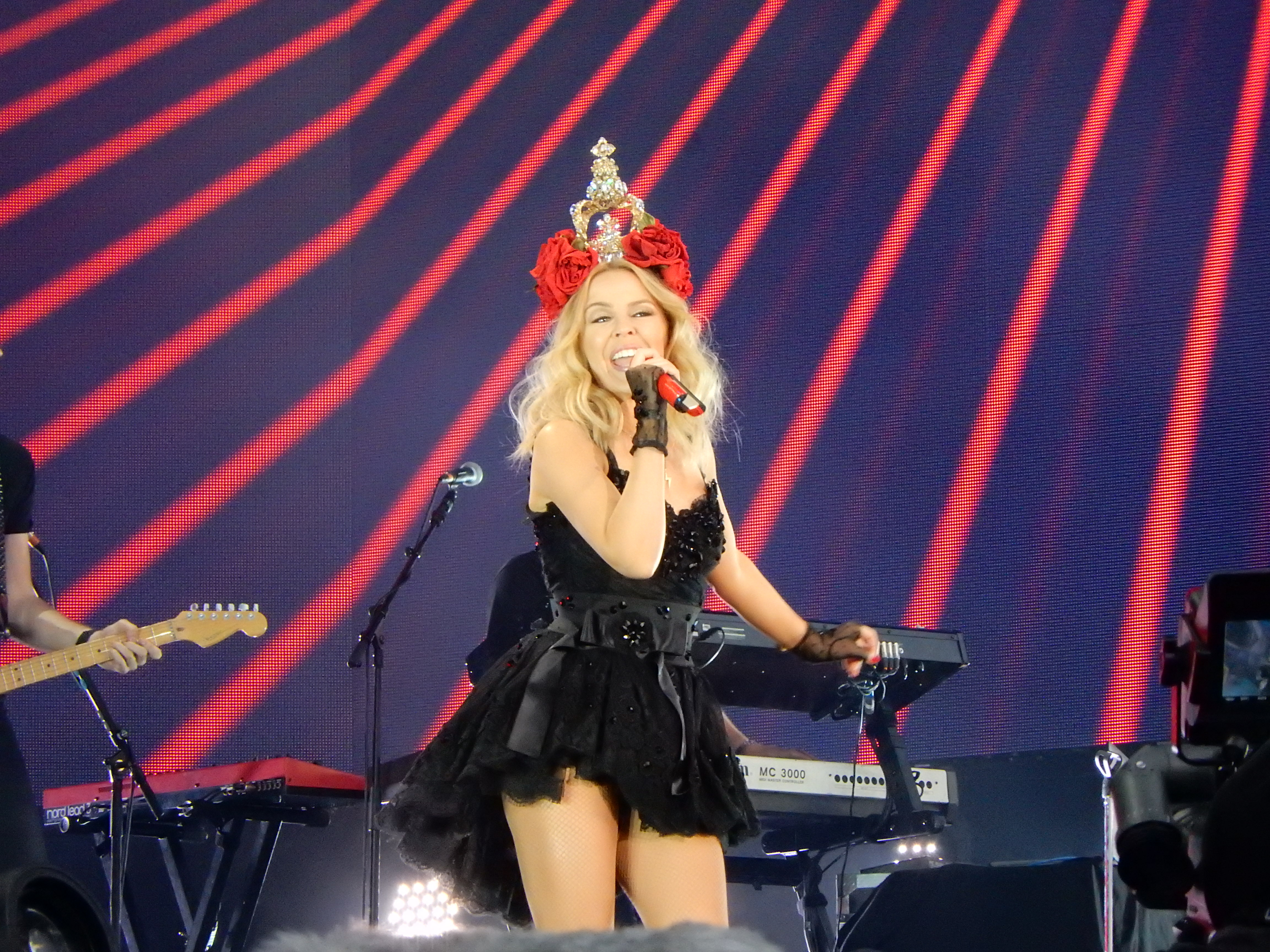 Kylie Minogue, BST Hyde Park, London